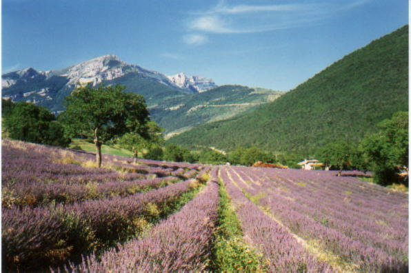 Lavendelfelder in Chamaloc vor dem Col de Rousset, Diois, Frankreich.